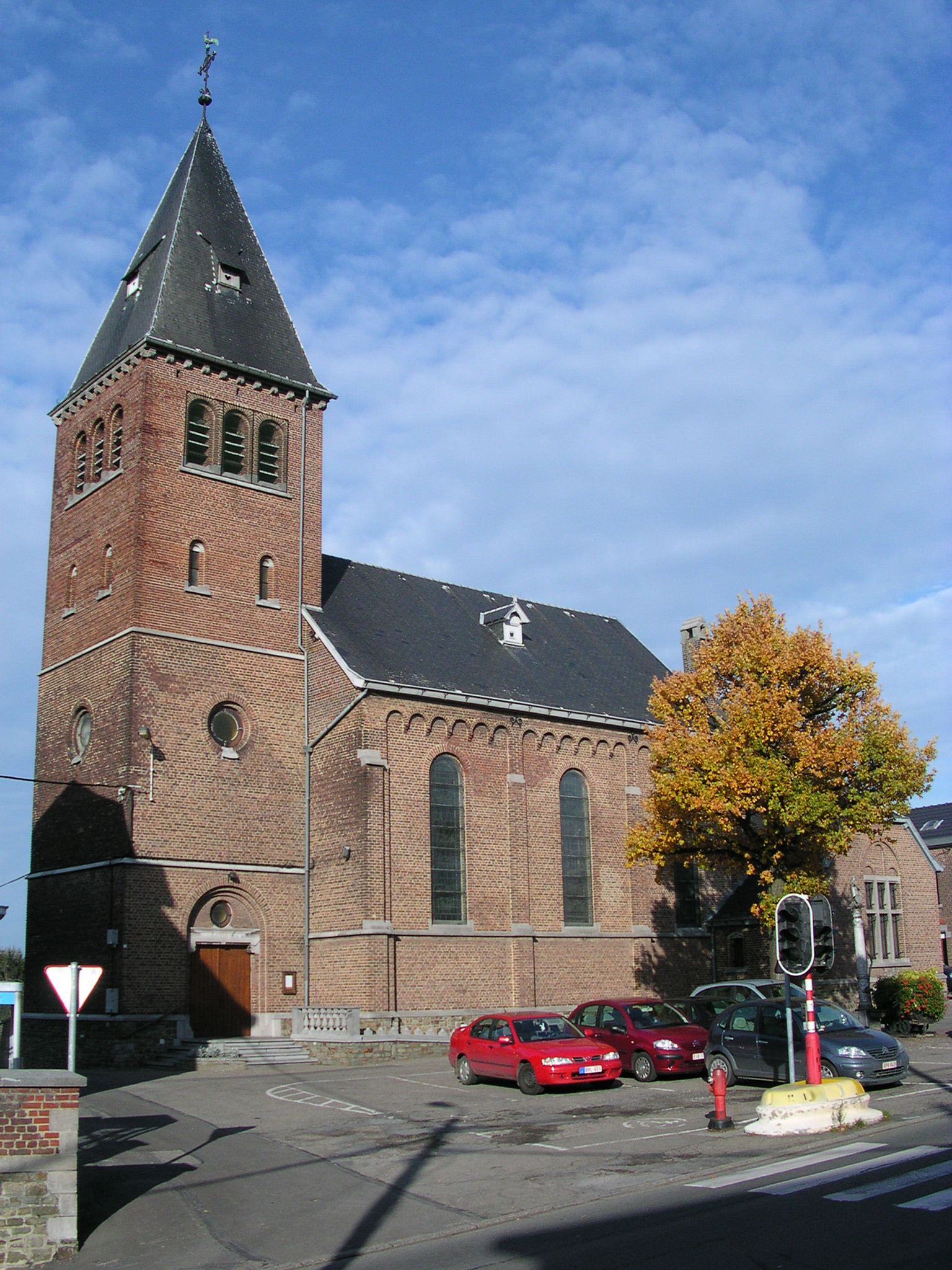 Kirche S. Clement in Barchon (gehört zu Blegny bei Lüttich)